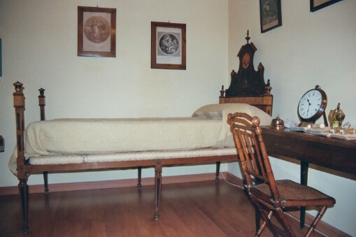 Llit de Jordi Joan i Santacília, que es pot veure en l'Alcúdia (Elx), on es va trobar la Dama d'Elx.